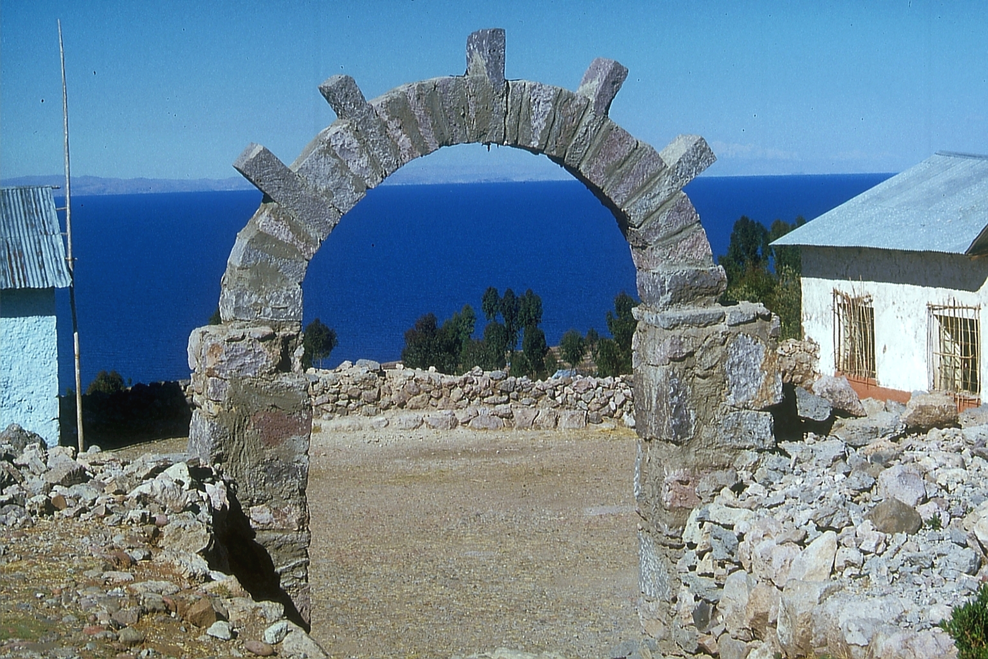 Isla Amantani im Titicaca-See